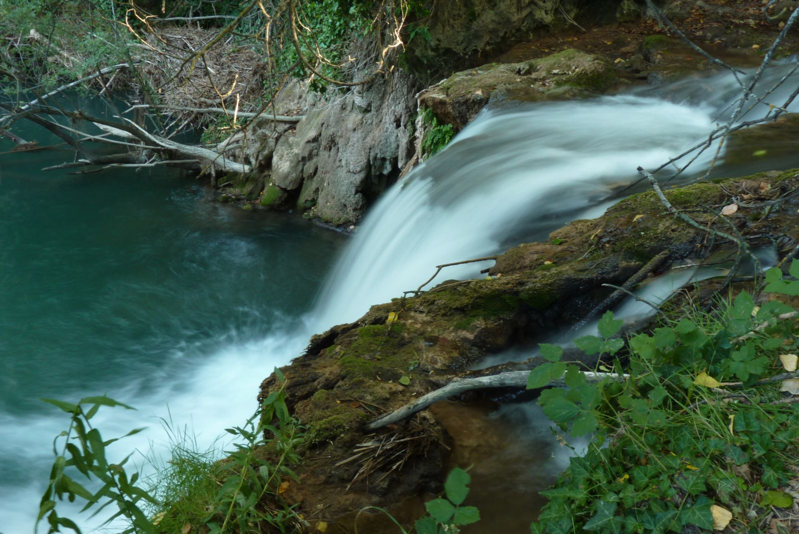 Salto de Agua en el río Manubles.